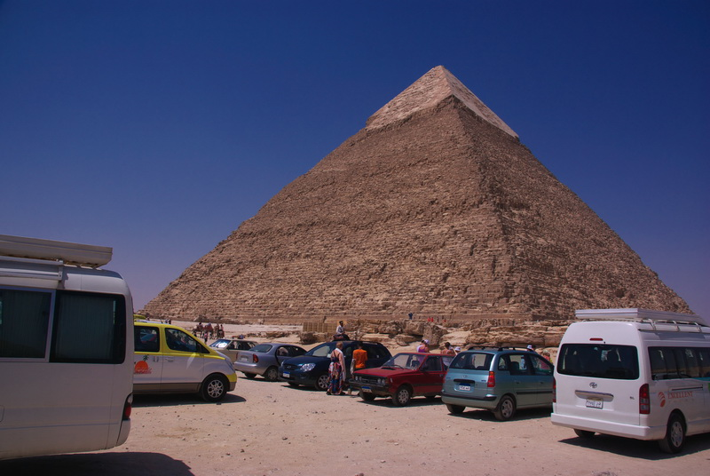 Pression touristique au pied de Khéphren